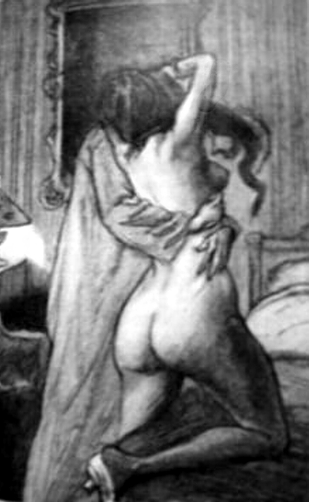 Illustration de Georges Jeanniot (1848-1934) pour Le Calvaire, d'Octave Mirbeau